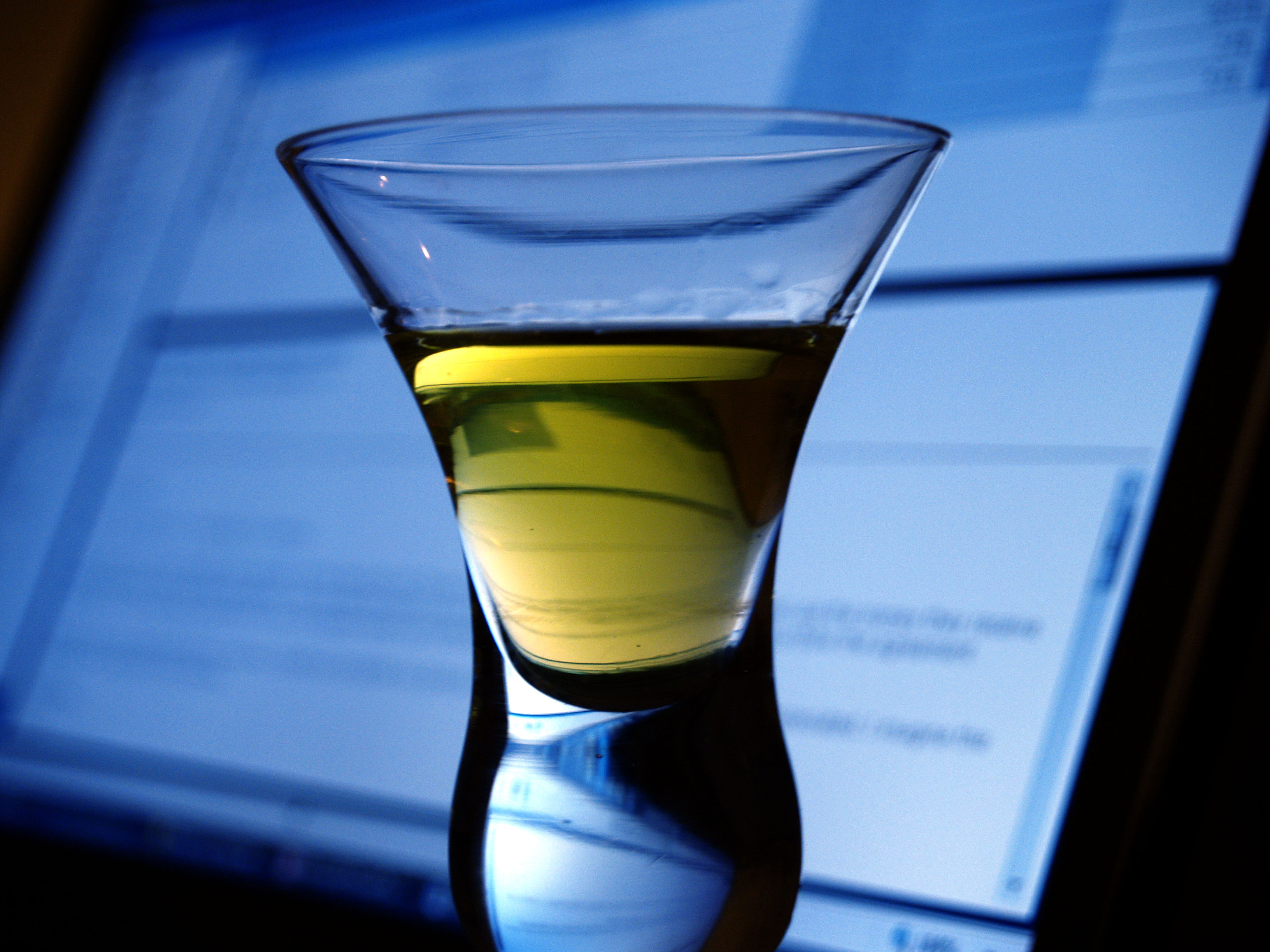 Snaps med æble og safran